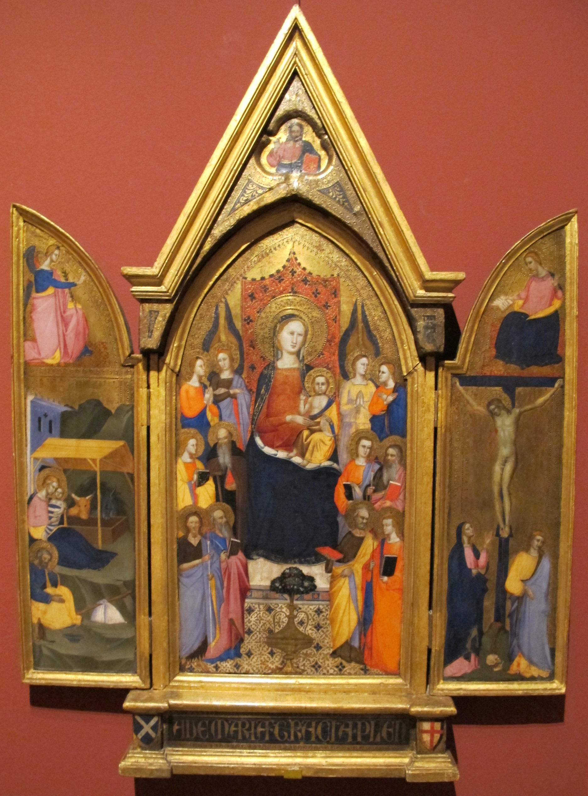 Maestro della misericordia, madonna col bambino e santi, annunciazione, natività, crocifissione, 1370 ca